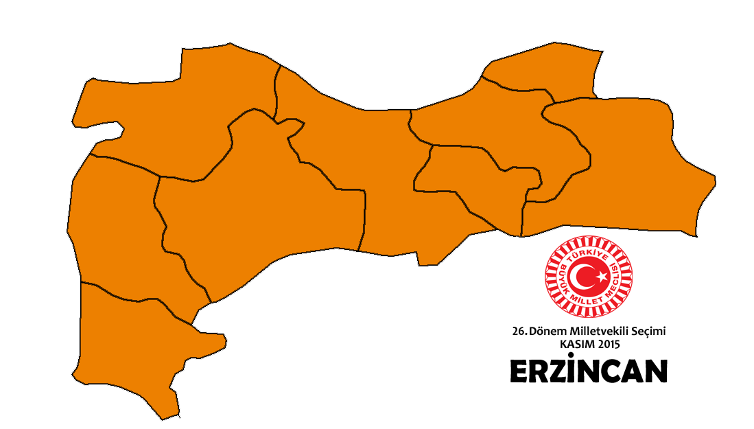 Kasım 2015 seçimleri